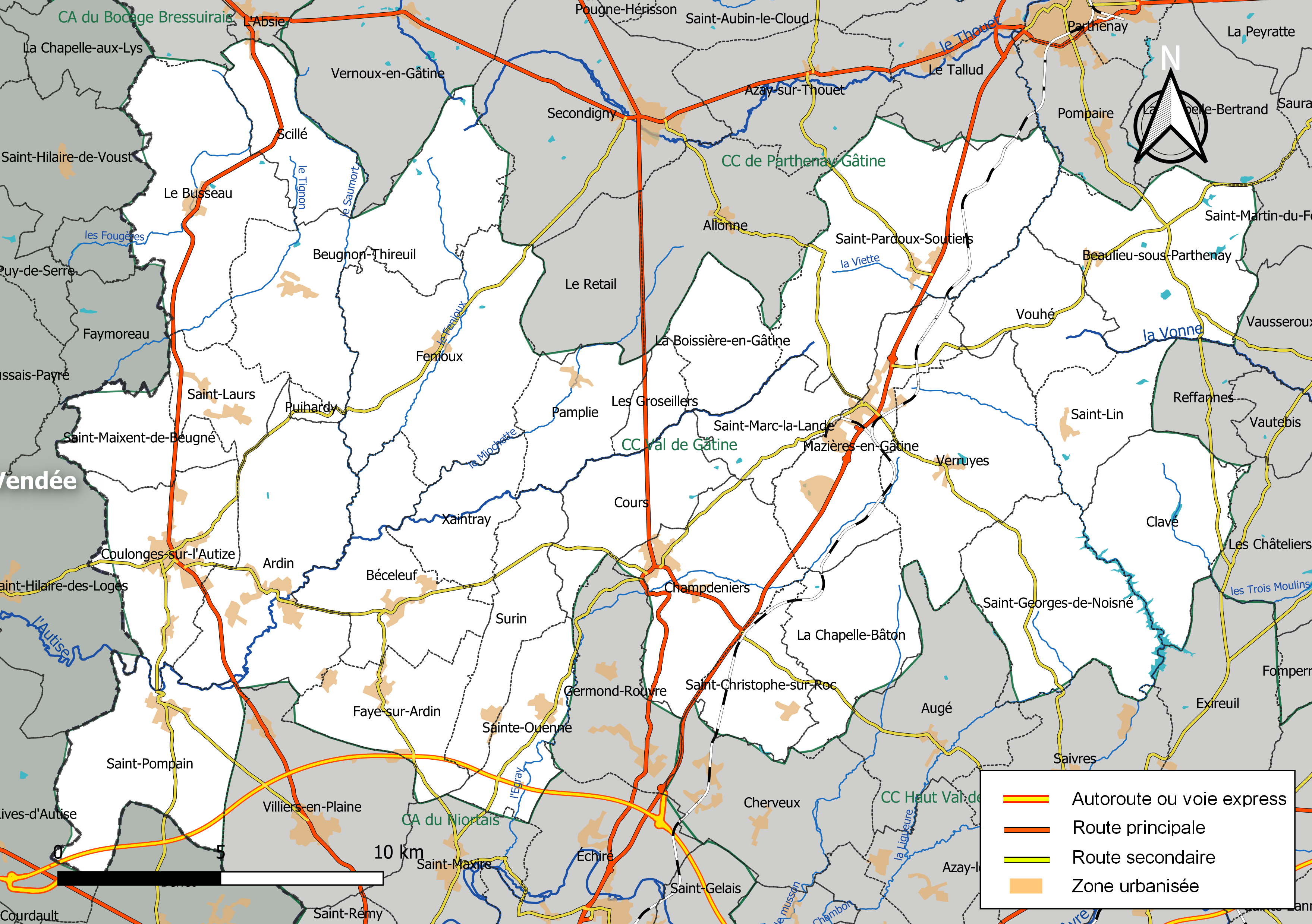 Carte géographique de la Communauté de communes Val de Gâtine, département des Deux-Sèvres, France. Composition au 1er janvier 2019.